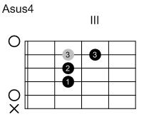 Eigenanfertigung